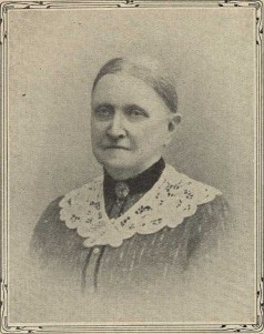 Augusta Barthelson i tidningen Idun 1913.